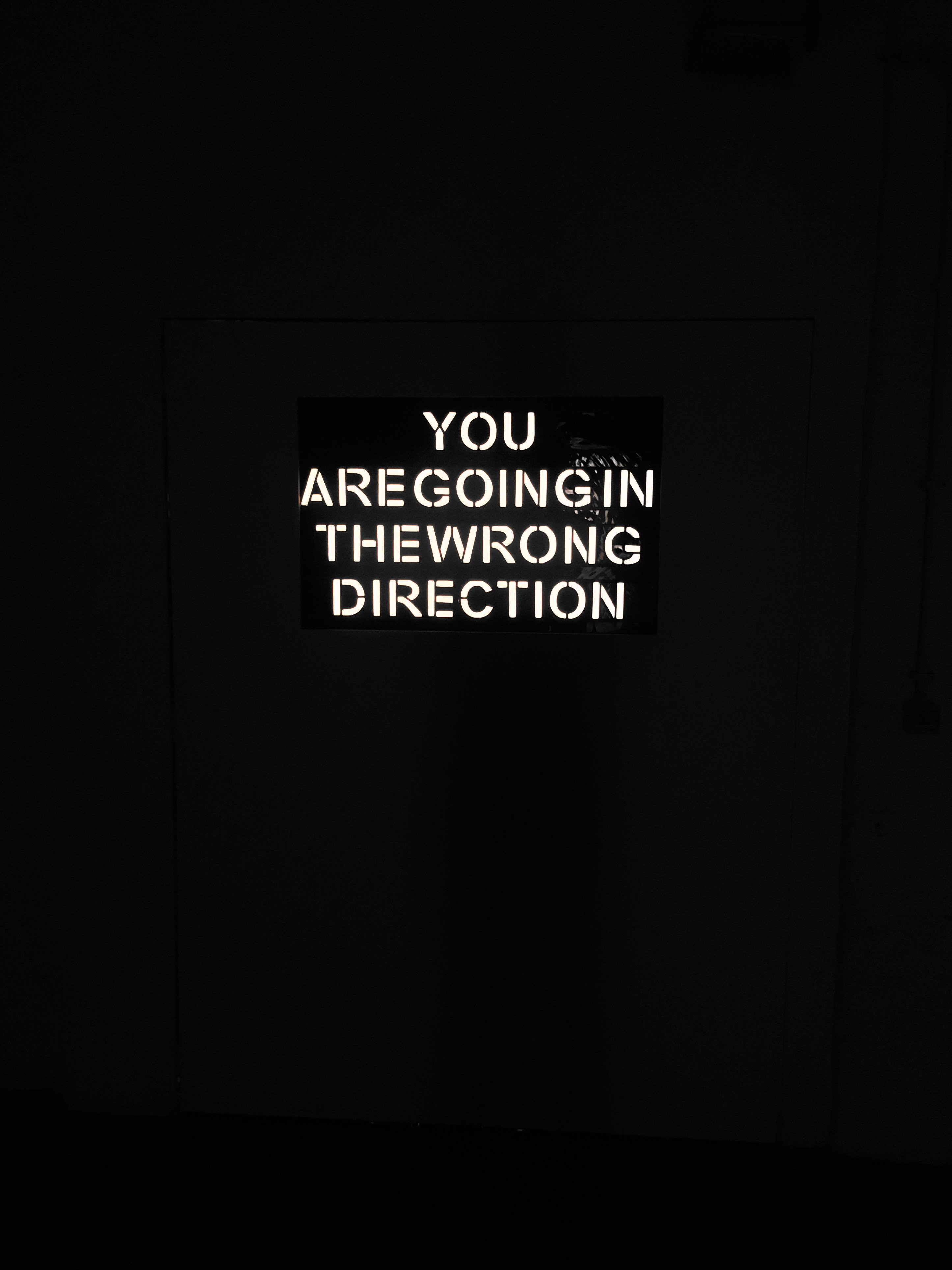 You Are Going In The Wrong Direction van Laure Prouvost in de tentoonstelling Occupie Paradit in Netwerk Aalst, 2020.